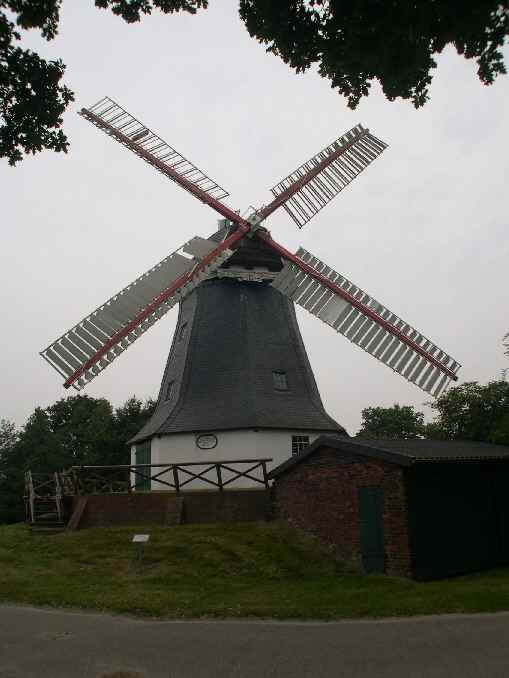 Worpswede Windmühle